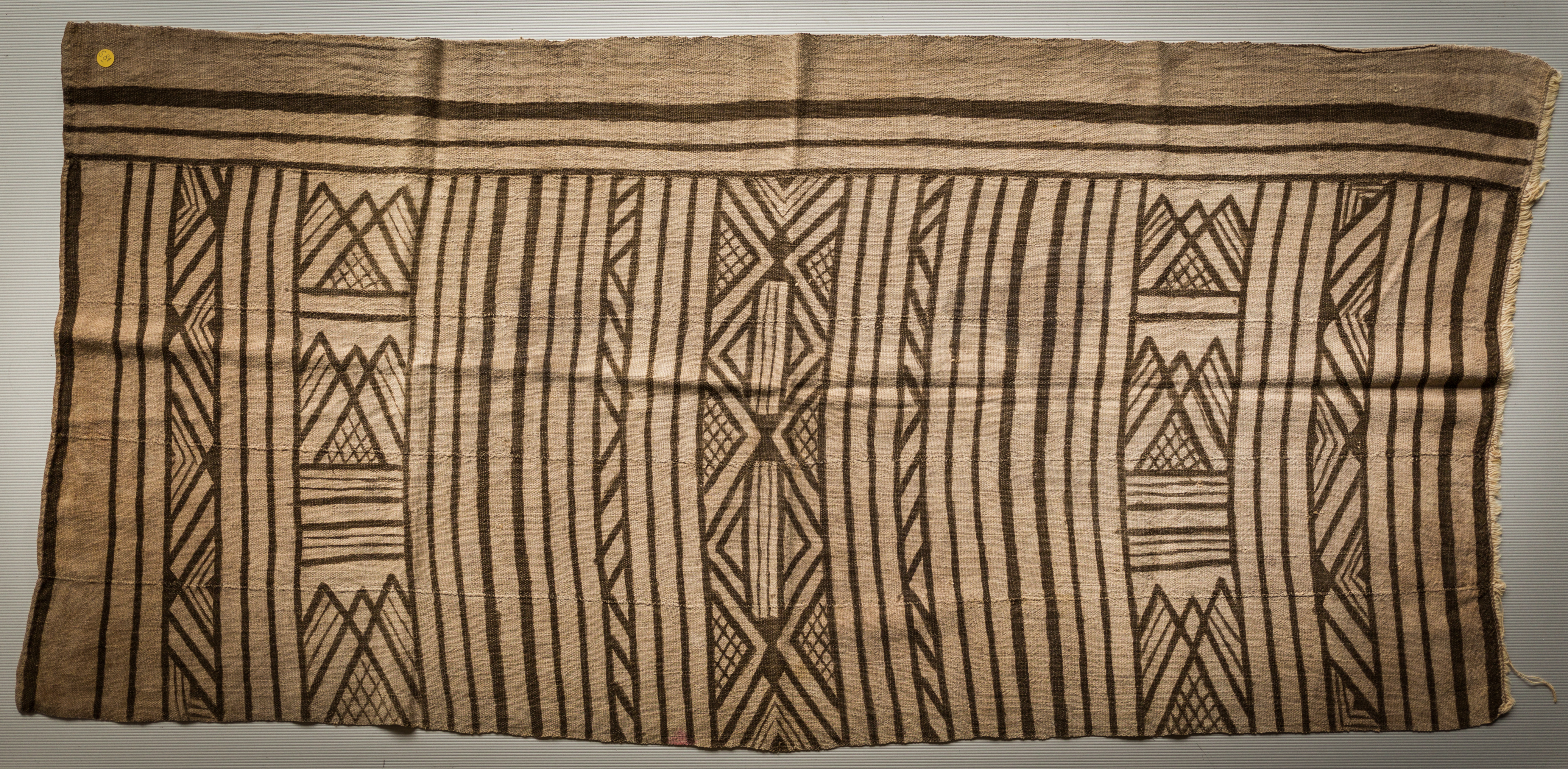 Pagne Provenance : Mali : cercle de Koutiala (Minianka) Matériaux : végétal ( coton, teintures) Collections d'objets ethnographiques de l'université de Strasbourg (cf. fiche détaillée dans la base de données Ethno de la Maison interuniversitaire des sciences de l'homme - Alsace) N° d'inventaire : 2002.0.069